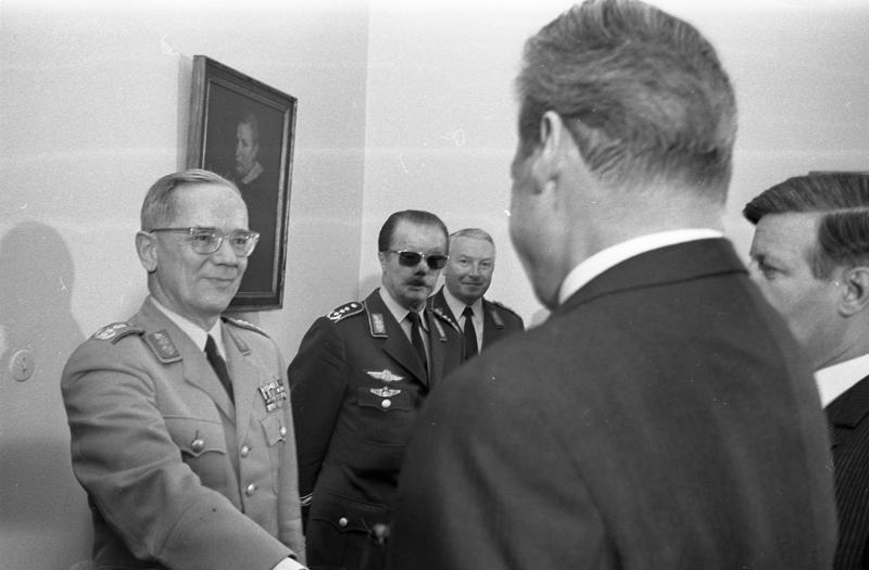 Bundeswehrführung bei Bundeskanzler Brandt in Bonn